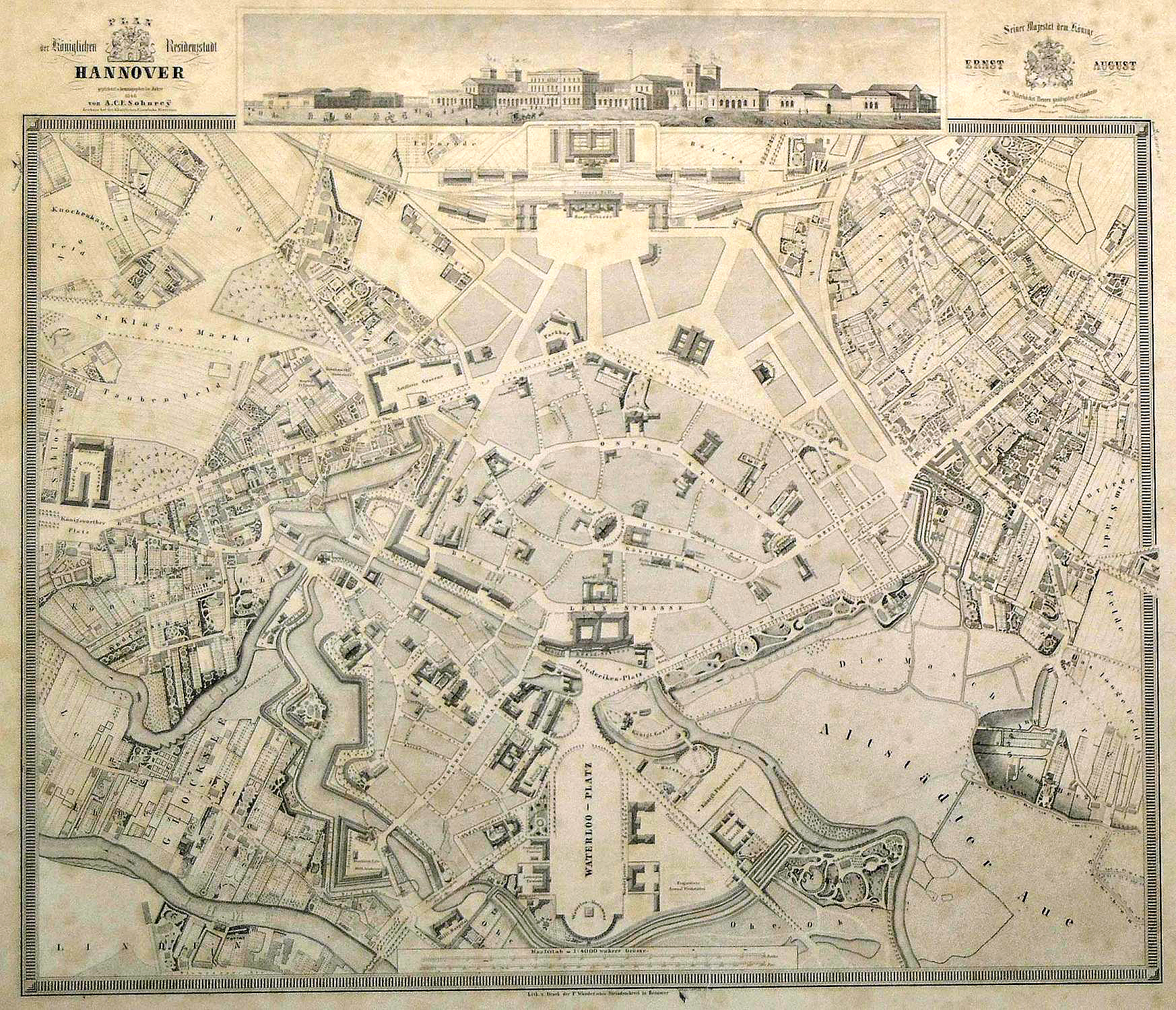 „Plan der Königlichen Residenzstadt Hannover gezeichnet und herausgegeben im Jahre 1846 von A. C. F. Sohnrey, Zeichner bei der Königlichen Eisenbahn Direction / Seiner Majestät dem König Ernst August mit Allerhöchst Dessen gnädigster Erlaubnis in tiefster Ehrfurcht allerunterthänigst gewidmet von A. C. F. Sohnrey, Zeichner bei der Königl. Eisenbahn Direction“ Während der Kopf des etwa 44,2 x 57,5 cm großen Blattes eine Zeichnung des seinerzeit auf freiem Felde erbauten Ernst-August-Platzes mit dem ersten Bahnhof der Residenzstadt aufweist, findet sich am Fuß der Werkes der Hinweis auf die Lithographie und den Druck in der seinerzeit von dem ersten Fotografen der Stadt, Friedrich Wunder betriebenen ehemaligen Baumgart’schen Druckerei, der damaligen F. Wunder`schen Steindruckerei in Hannover ... Dieses nur gering aufgelöste und schwer lesbare Digitalisat dient nur vorübergehend als Platzhalter für einen wesentlich besseren, hochaufgelösten Scan des historischen Stadtplanes, mit dem dann nicht nur unseren eigenen Nachkommen, Kindern und Jugendlichen bessere Bild(ung)s-Chancen ermöglicht werden sollen ...